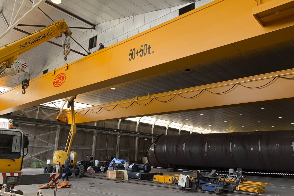 Grua puente JASO para producción sector eólico, para 50+50 t. de capacidad